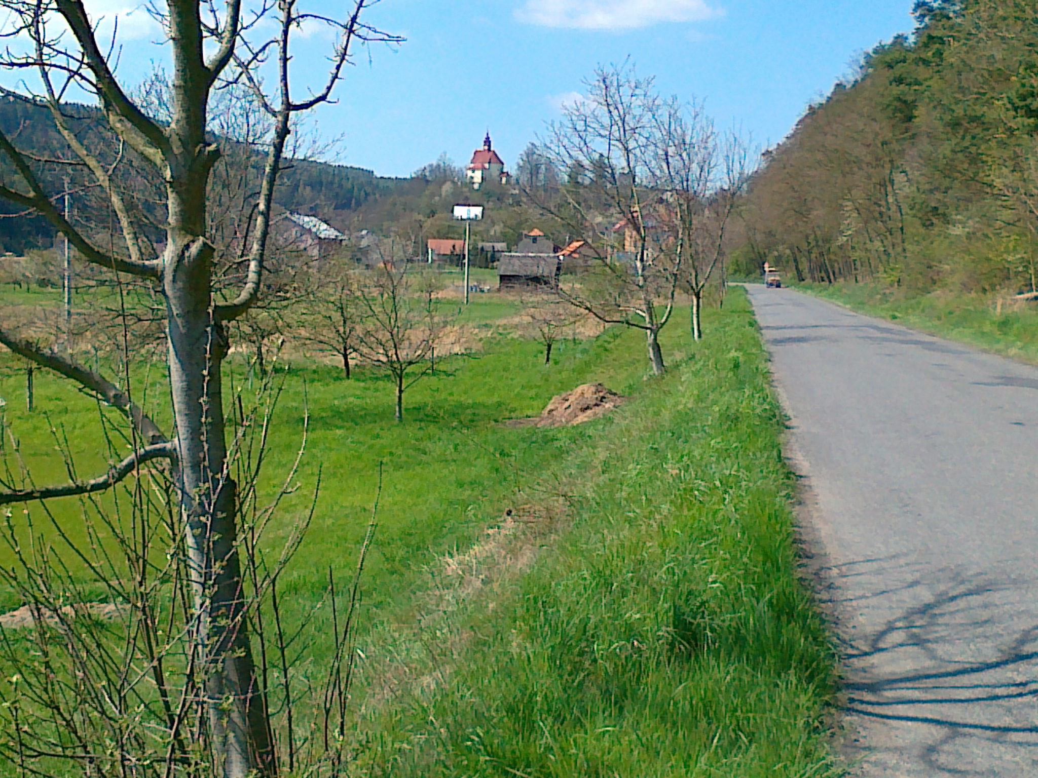 na Zelený čtvrtek 2014